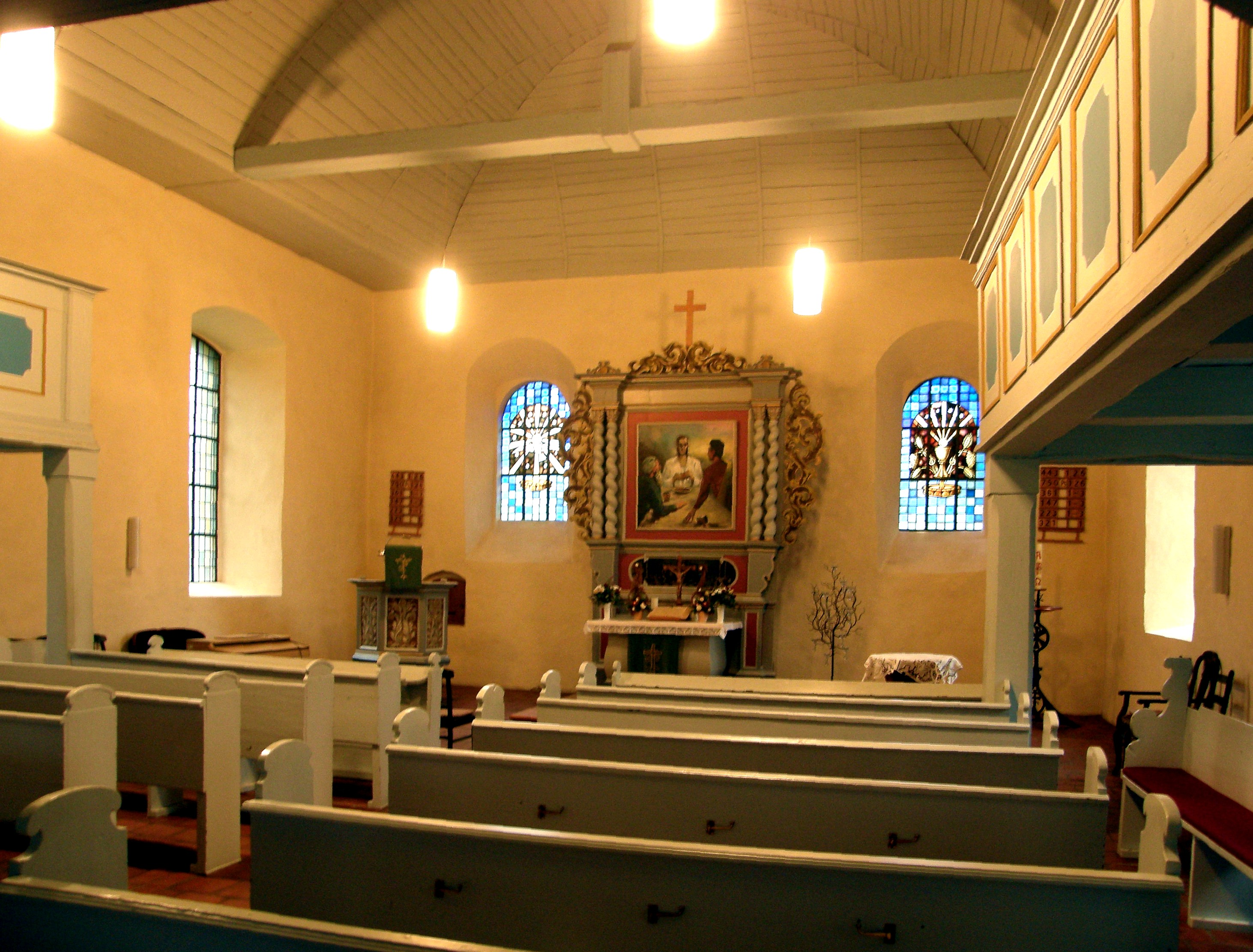 Falkenhagener Dorfkirche, Kirchenraum mit Kanzel, Altar, Emporen